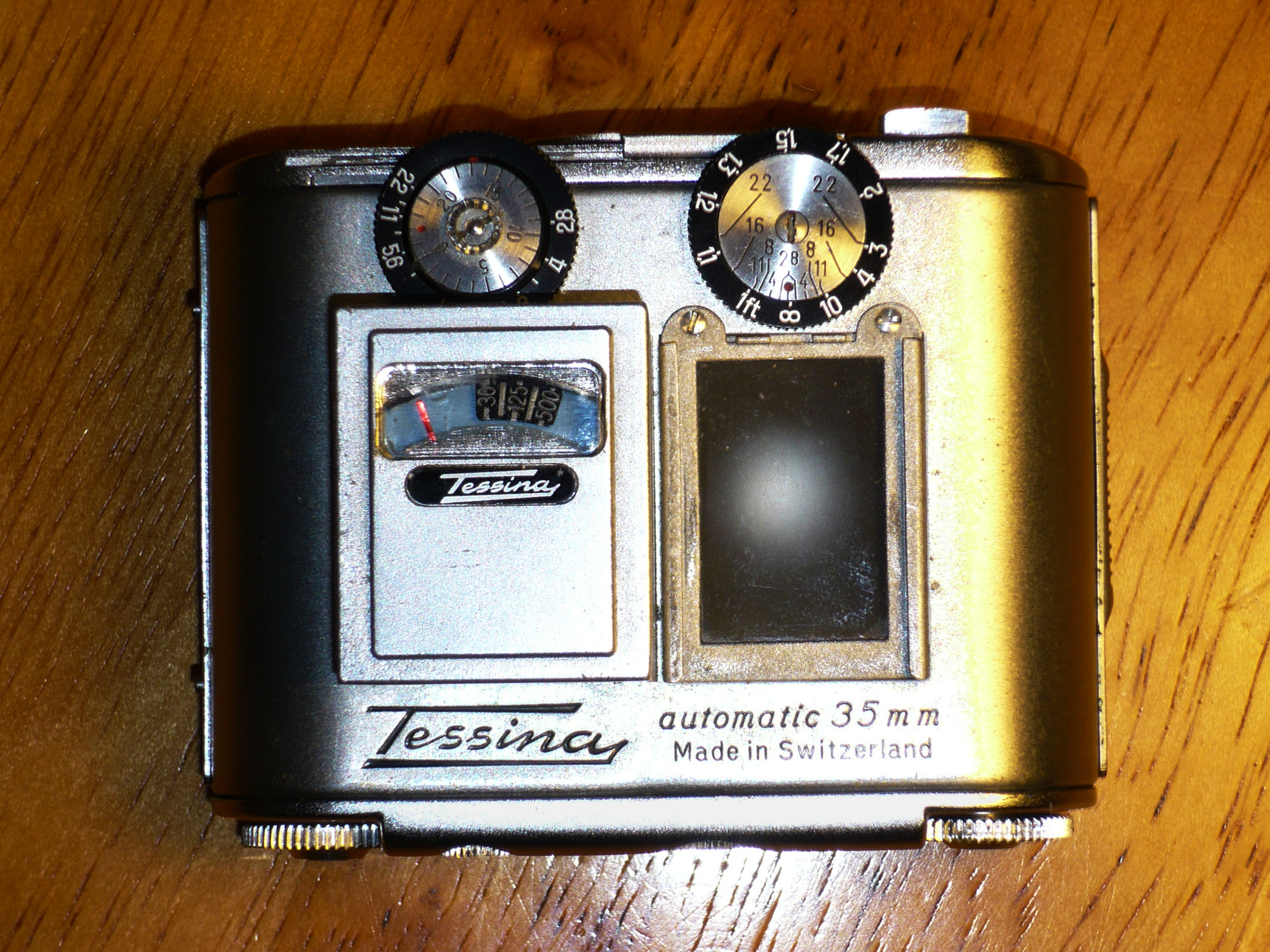 Tessina selenium meter 特熙纳硅测光表